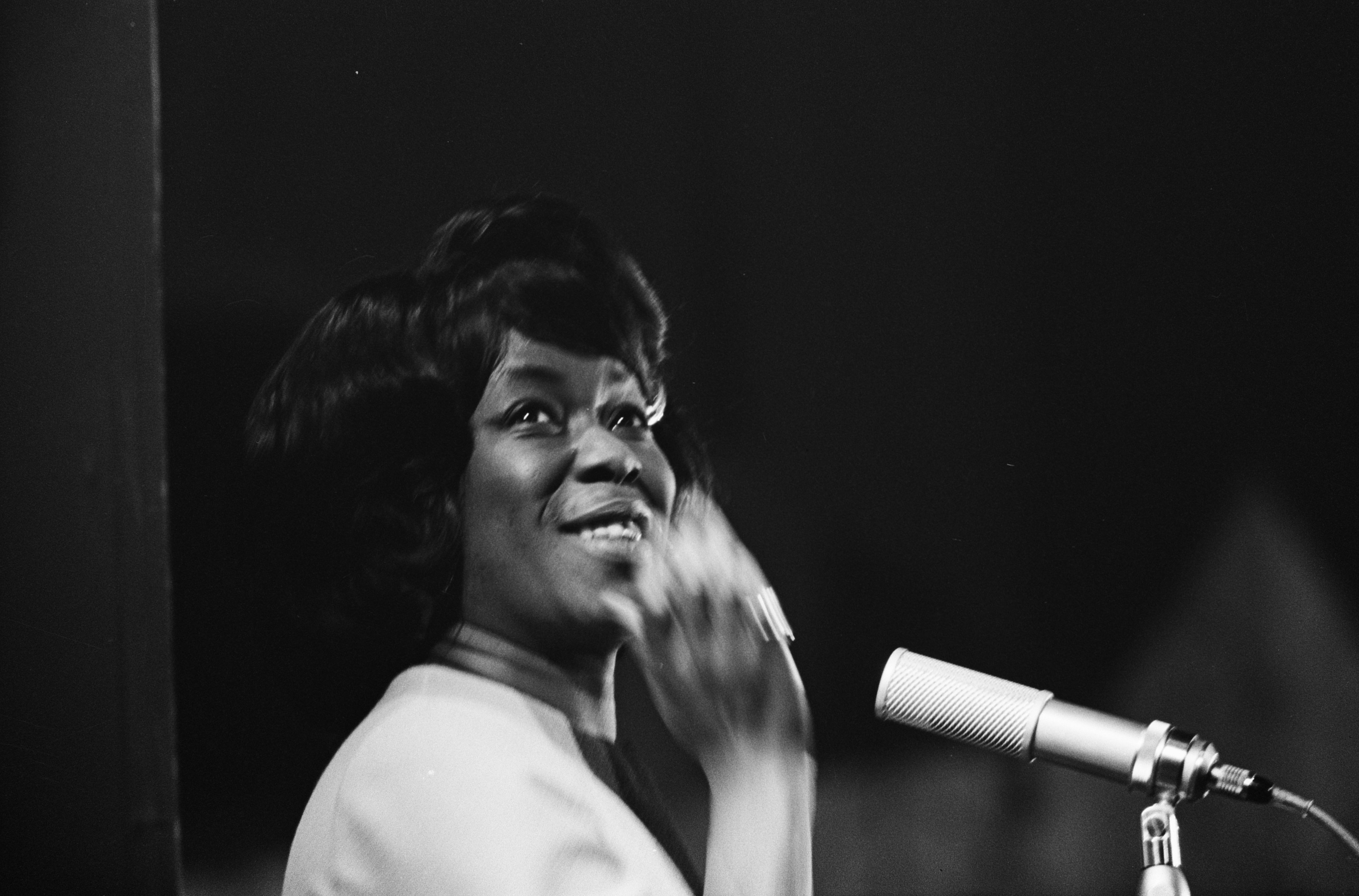 Collectie / Archief : Fotocollectie Anefo Reportage / Serie : [ onbekend ] Beschrijving : Grand Gala du Disque populaire in Kurhaus te Scheveningen Sarah Vaughan Datum : 12 oktober 1963 Locatie : Scheveningen, Zuid-Holland Instellingsnaam : Kurhaus Fotograaf : Koch, Eric / Anefo Auteursrechthebbende : Nationaal Archief Materiaalsoort : Negatief (zwart/wit) Nummer archiefinventaris : bekijk toegang 2.24.01.05 Bestanddeelnummer : 915-6269